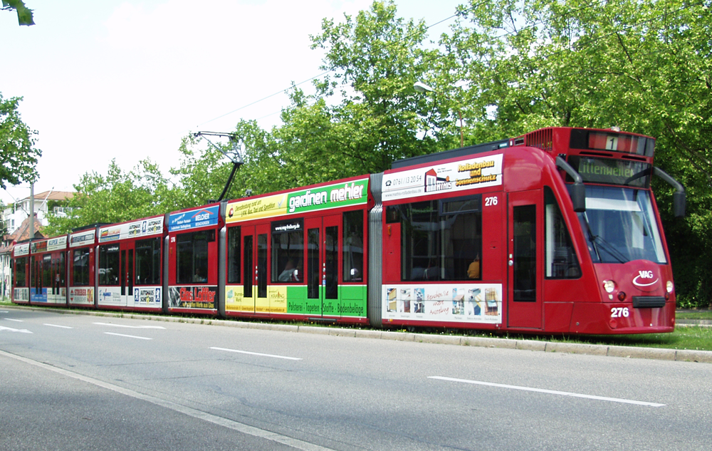 Straßenbahn (Typ Combino) auf der Linie 1 in Freiburg im Breisgau